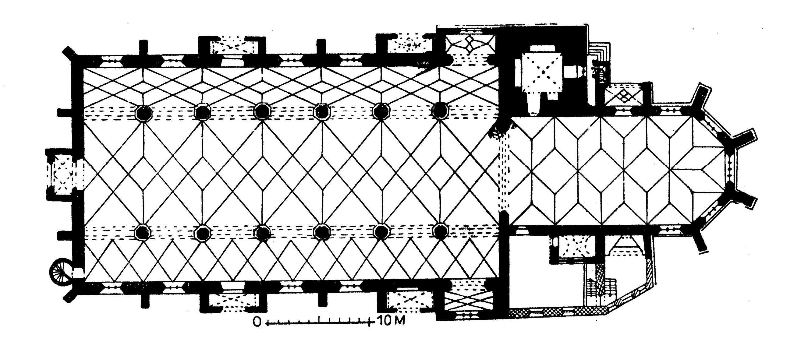 Grundriss Stadtpfarrkirche Mariä Himmelfahrt in Donauwörth